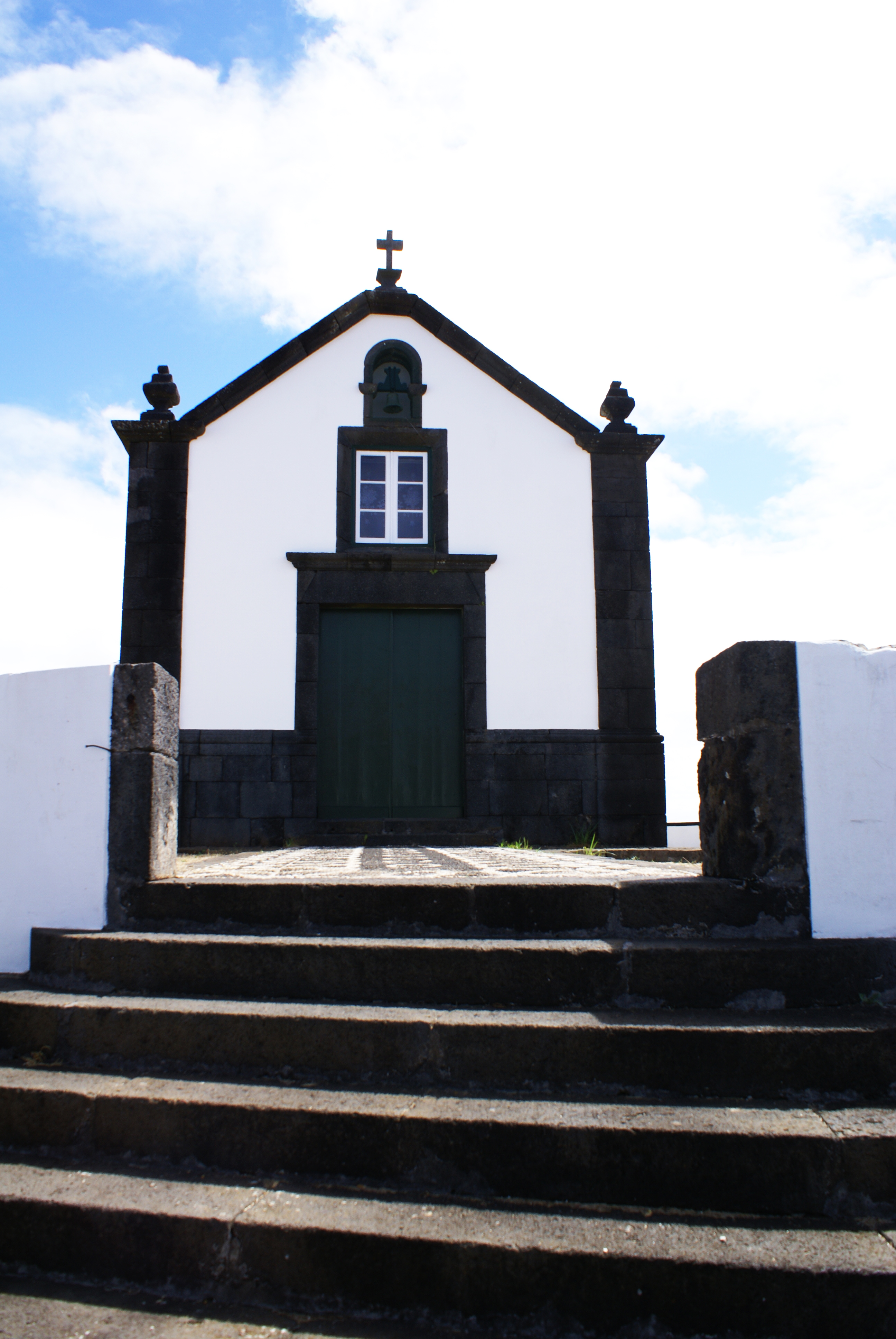 Ermida de Nossa Senhora da Boa Nova, Santa Cruz da Graciosa, ilha Graciosa, Açores, Portugal